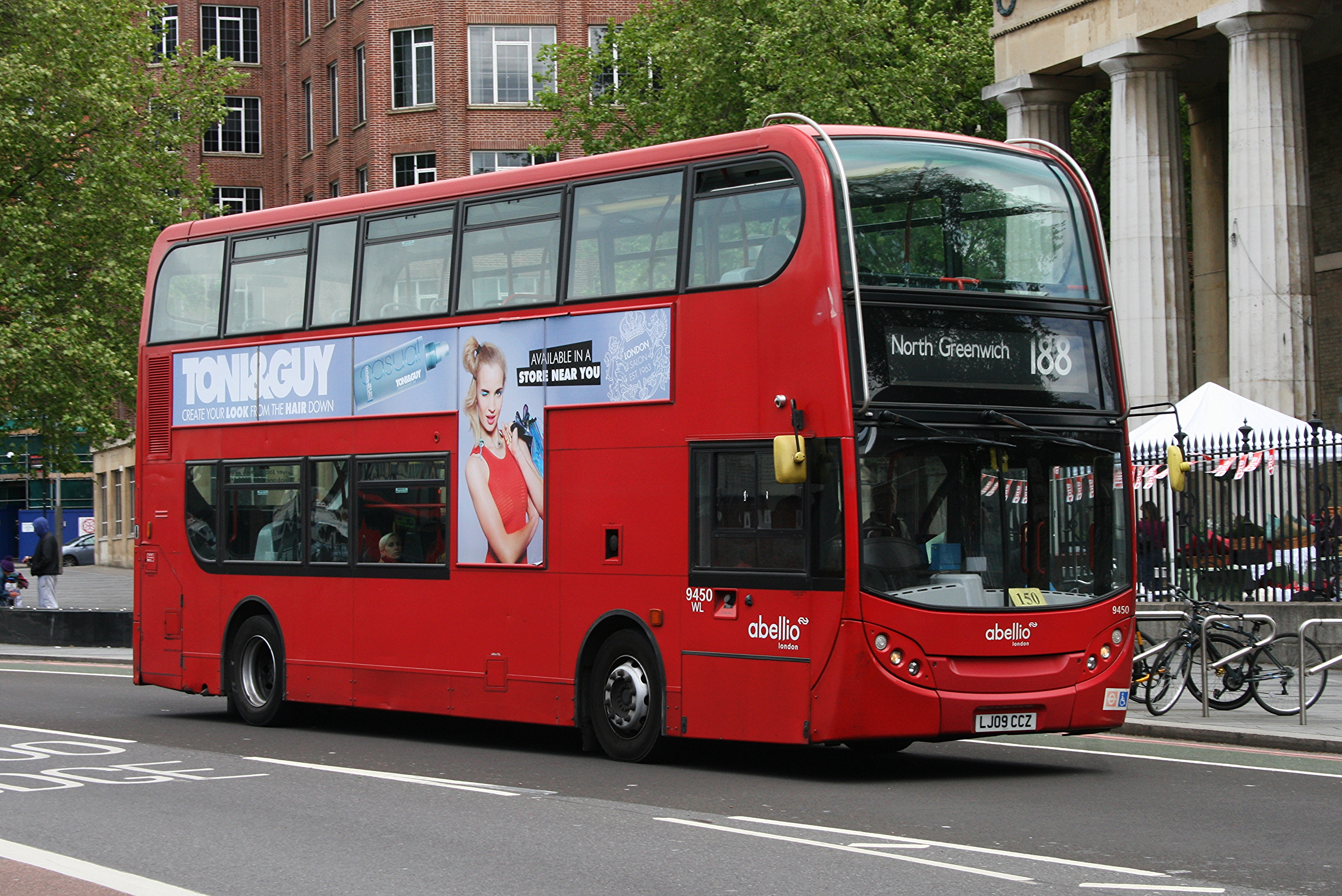 LJ09 CCZ